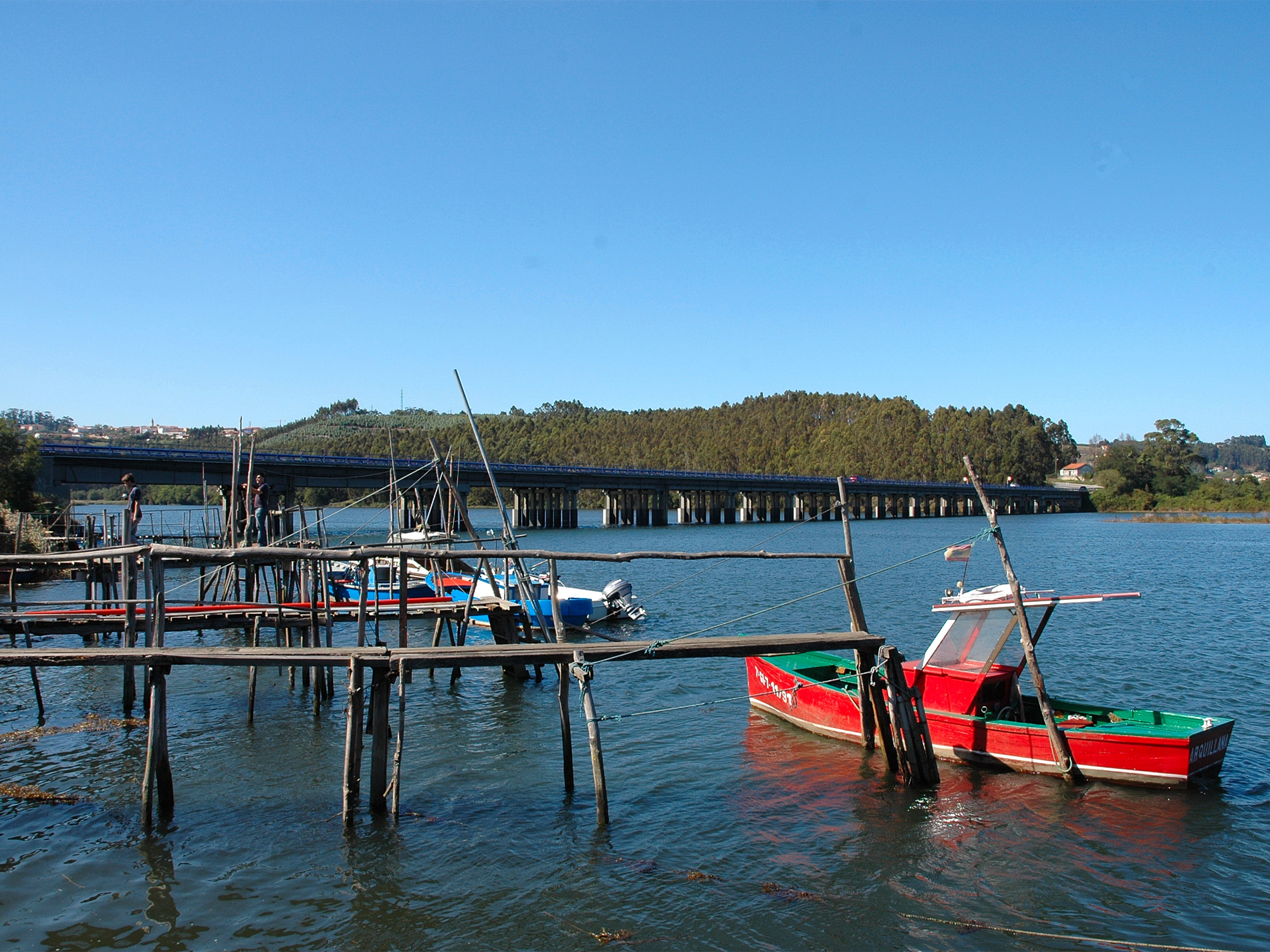 Río Nalón Autor: Ramón Noriega